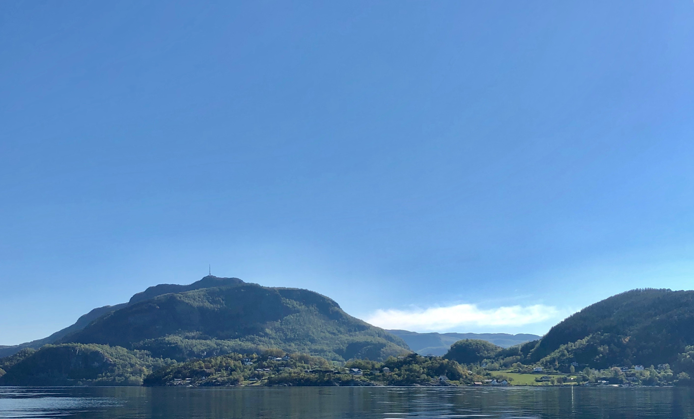 View of Fister from the fjord